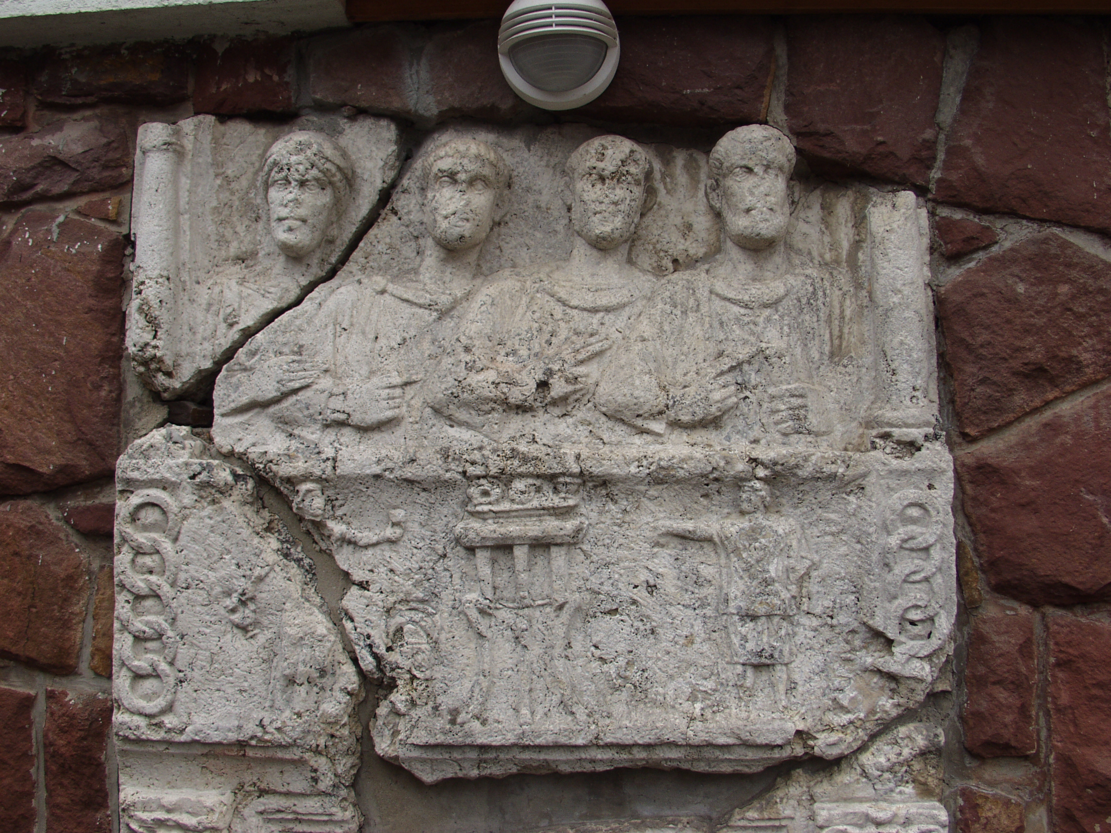 Aurelius Respectus síremléke Balatonszemesen – négyalakos felső rész